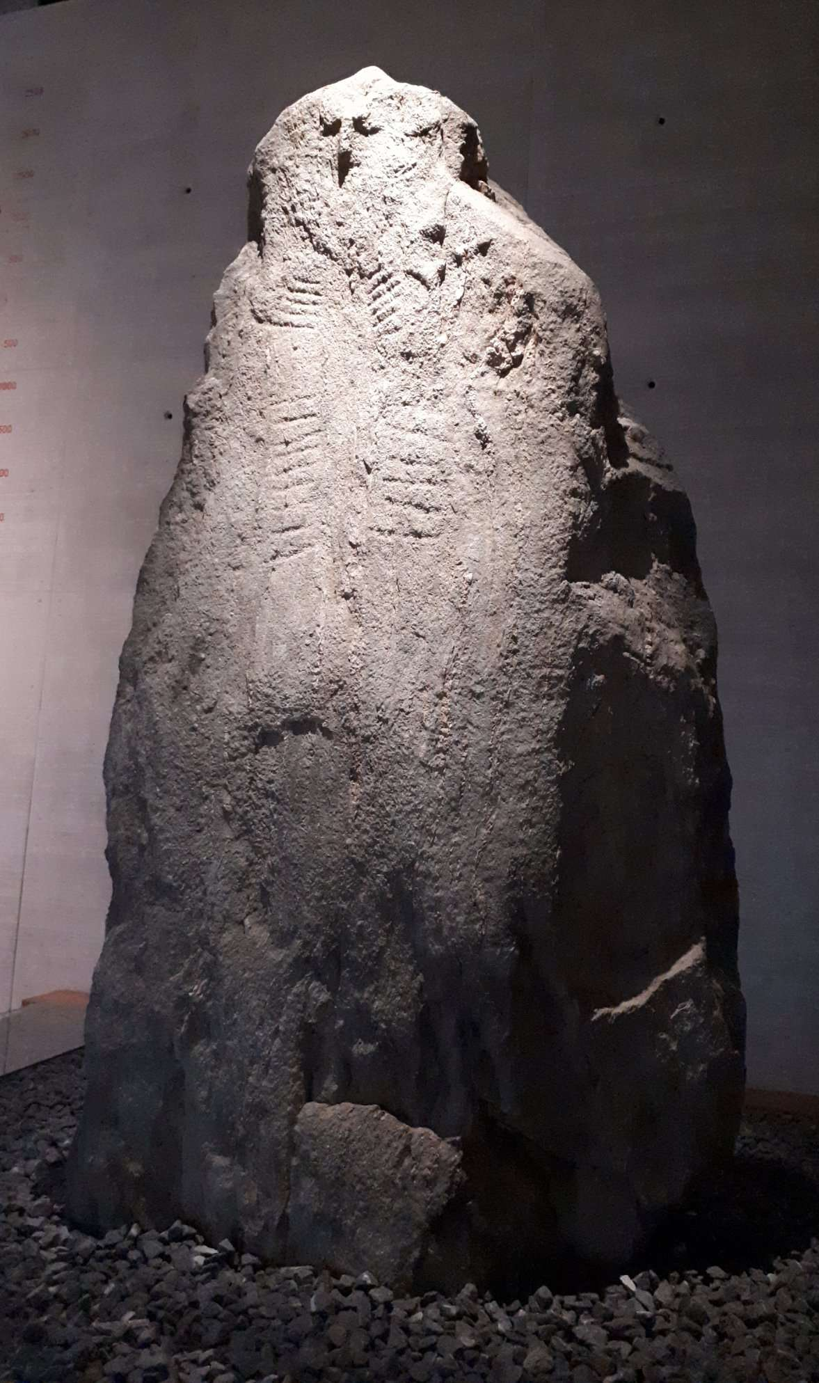 Une des deux statues-menhirs trouvé sur le site de Treytel-A Sugiez à Bevaix NE, Suisse, fouillé entre 1996 et 2000, aujourd'hui exposé au Laténium, Musée cantonal d'archéologie de Neuchâtel, à Hauterive. Installé entre 4600 et 3700 av. J.C., la statue-menhir fut redécorée avec de nouveaux motifs au début du 3e millénaire av. J.-C. pour une réutilisation après une période d'abandon du site.